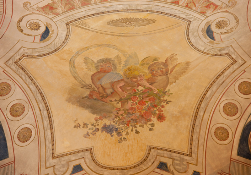 Ballhaus Pankow - Detail Innenverzierung